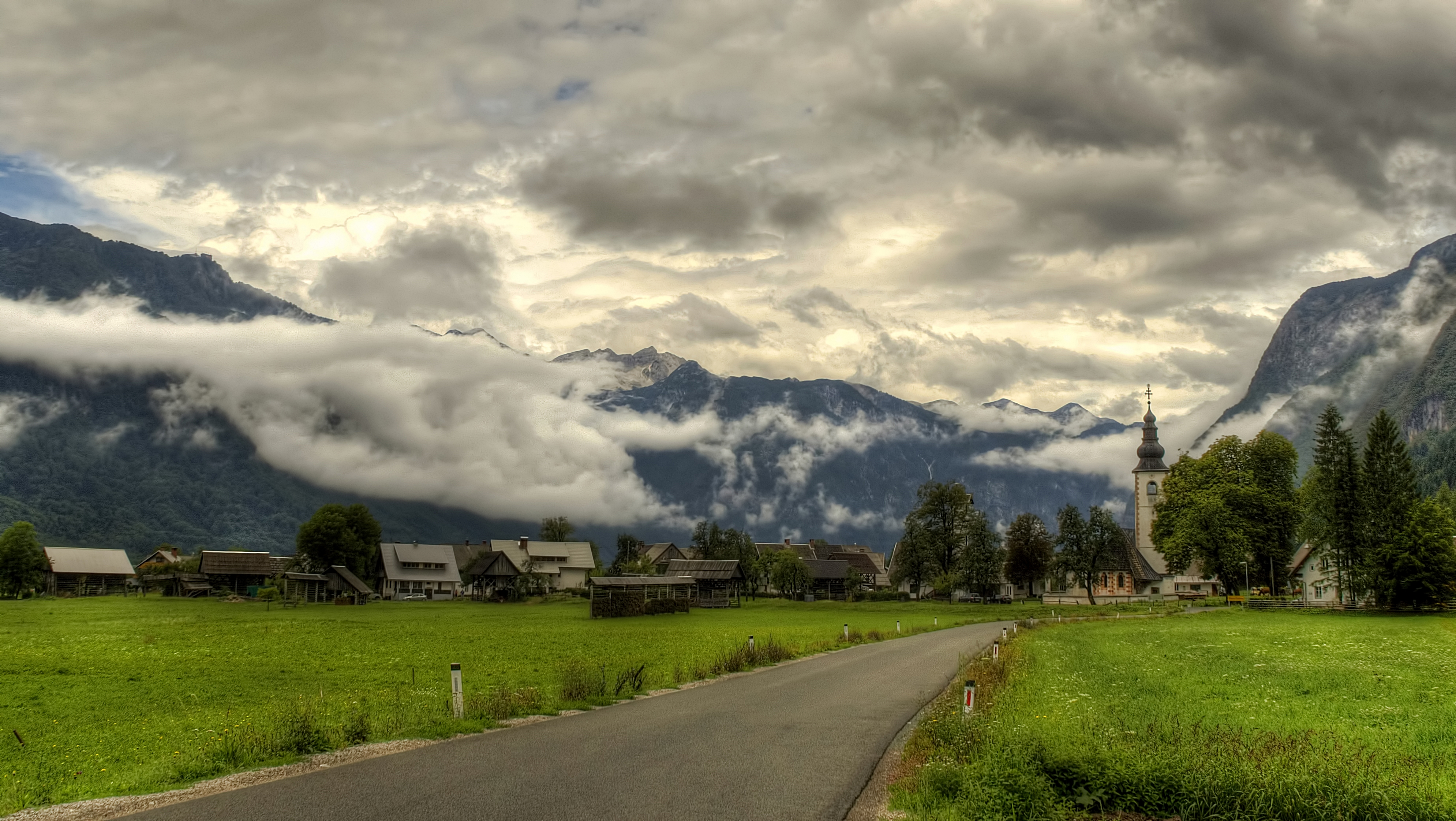 Stara Fuzina